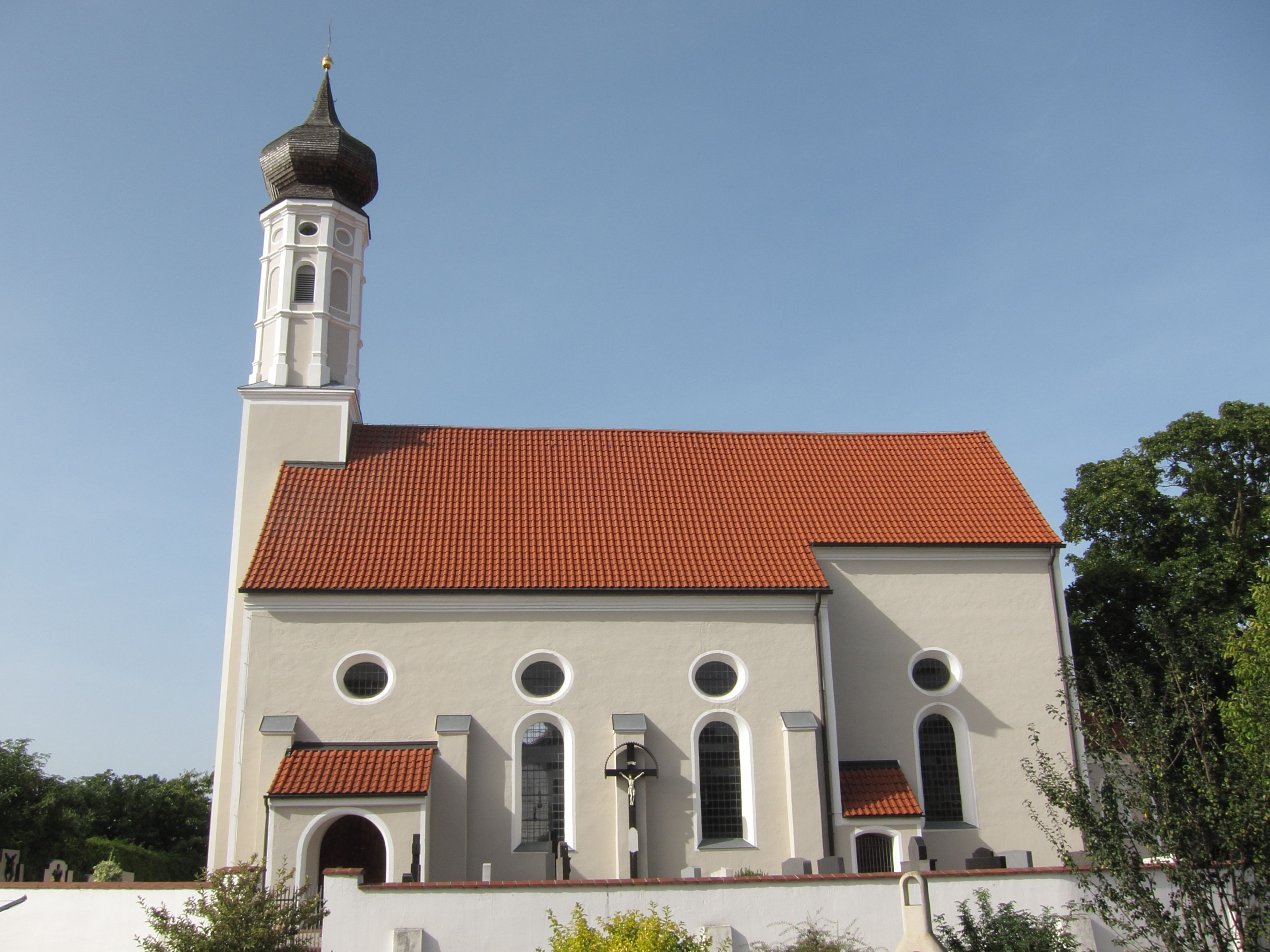 Niederlern; Kath. Filialkirche St. Andreas, barocker Saalbau über mittelalterlichem Vorgängerbau mit eingezogenem geradem Chorabschluss und Zwiebelturm, erbaut von Hans Kogler, 1678; mit Ausstattung.